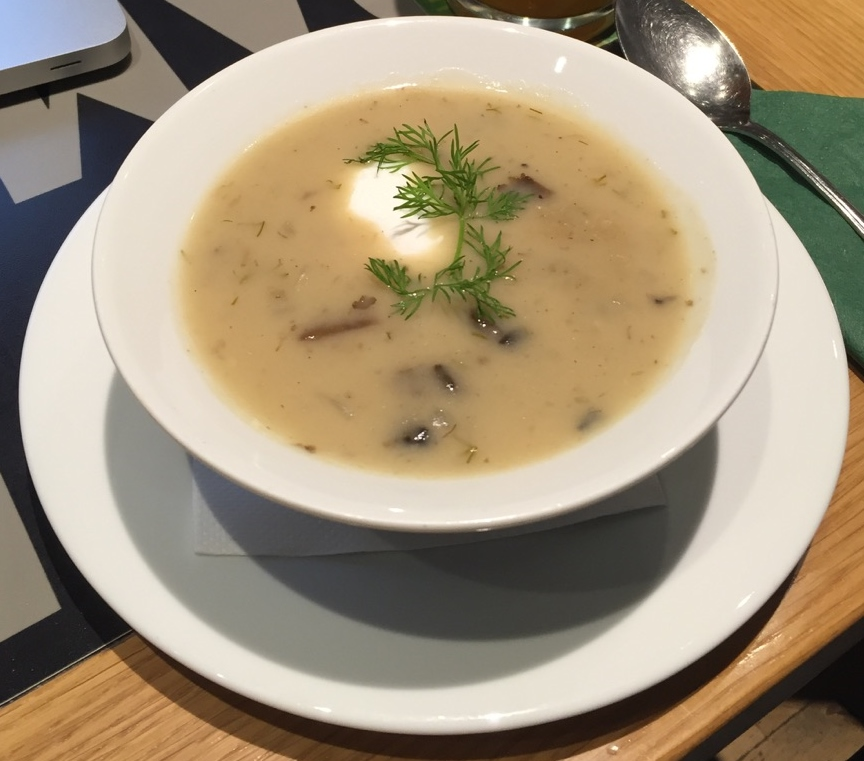 Kulajda - Tschechische Spezialität